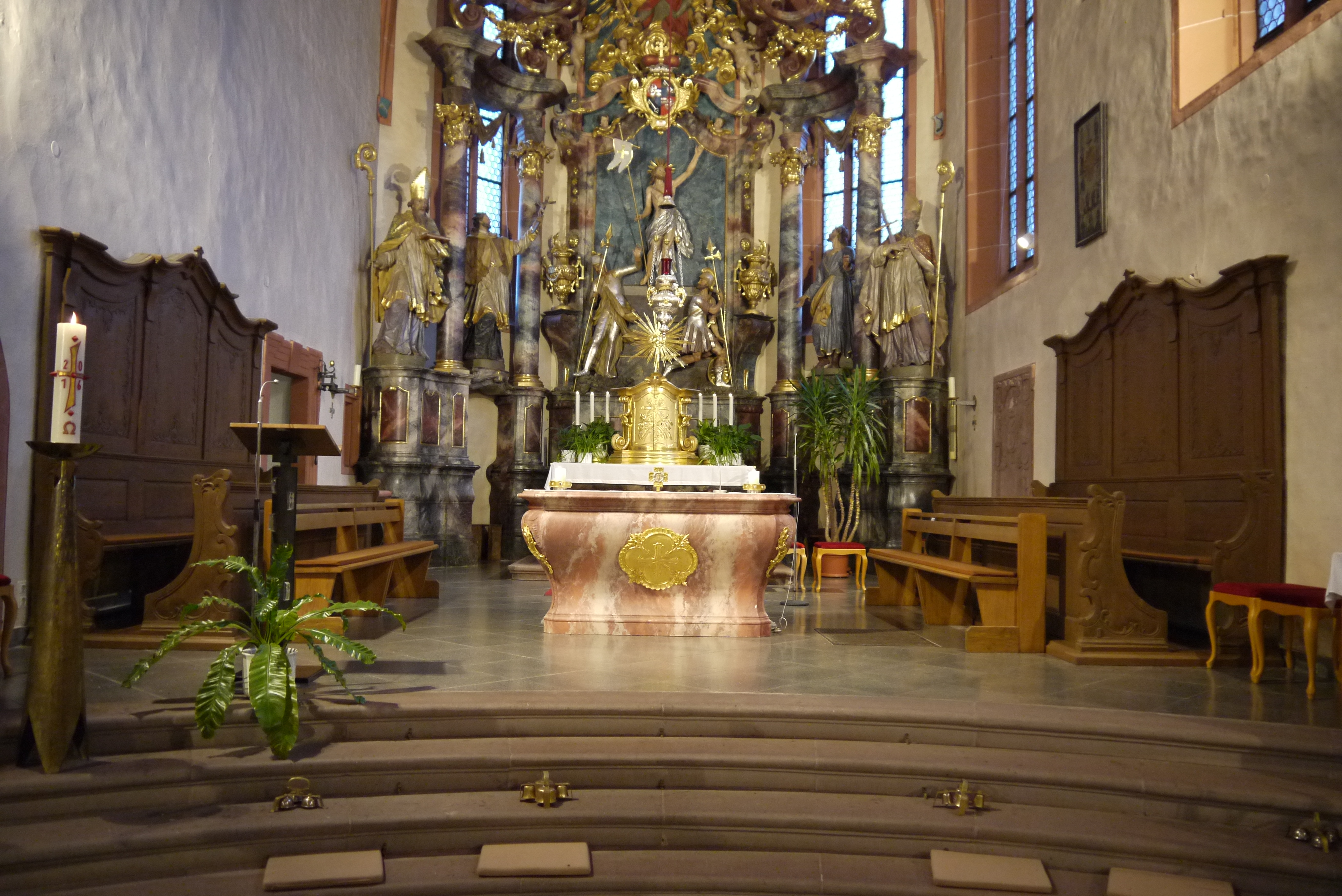 Kirche St. Martin Külsheim